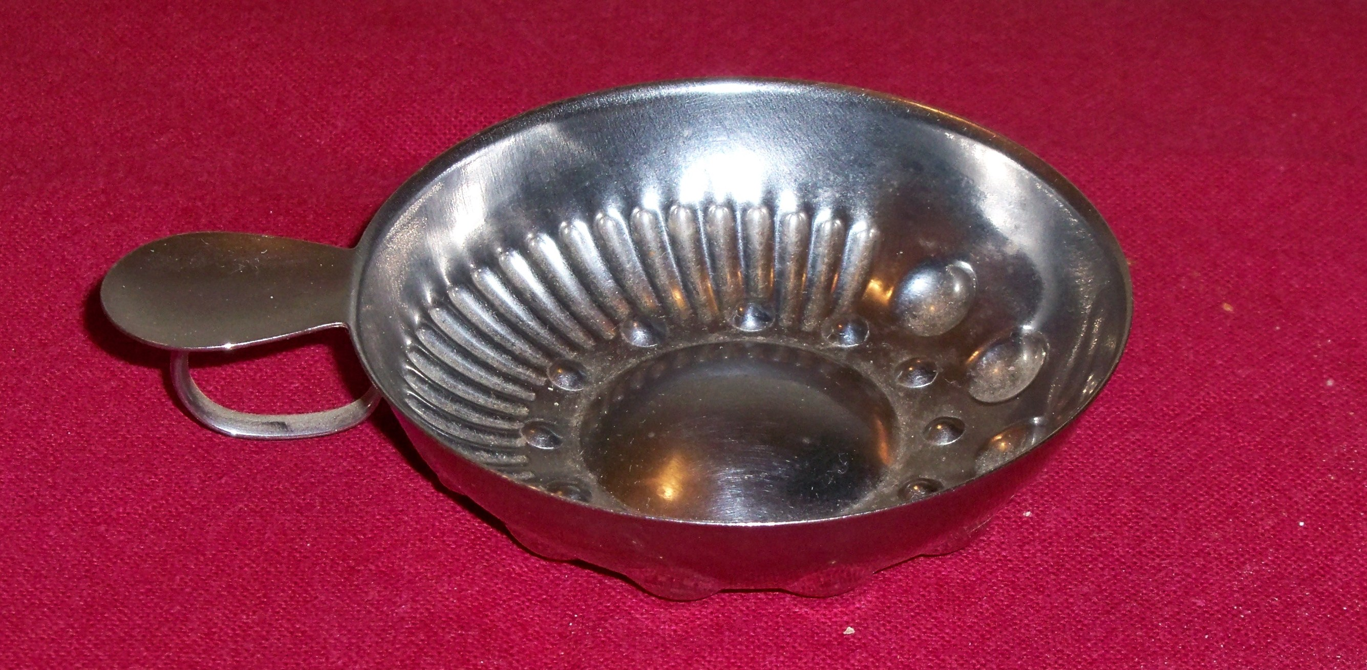 Tastevin